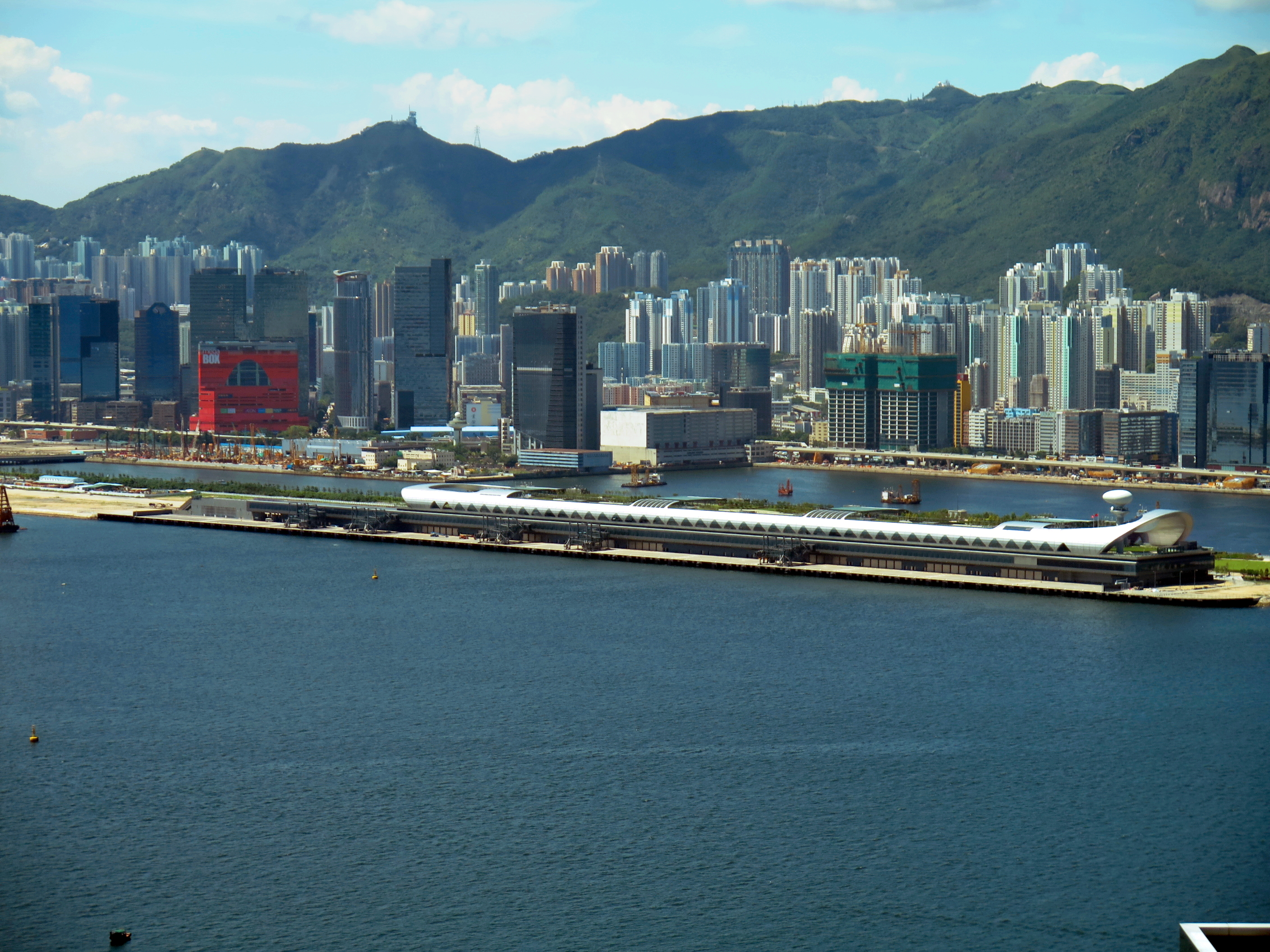 Kai Tak Cruise Terminal